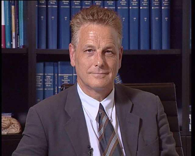 Bild Hans-Jürgen Möller